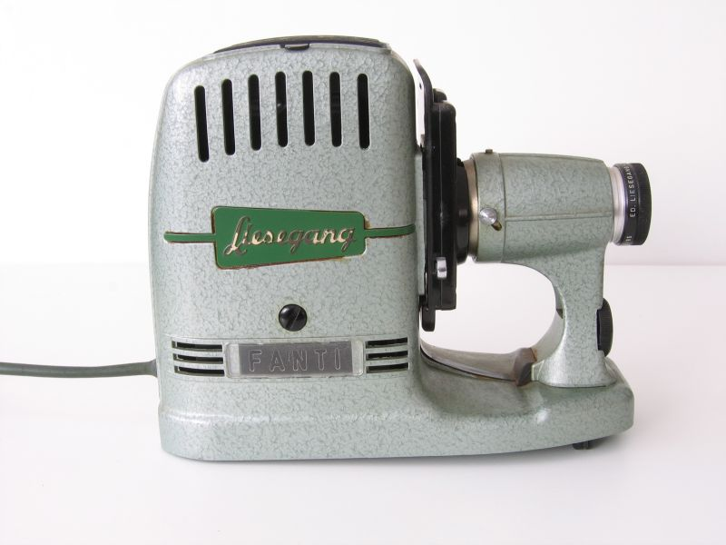 Diaprojektor Liesegang "Fanti", 1950er Jahre